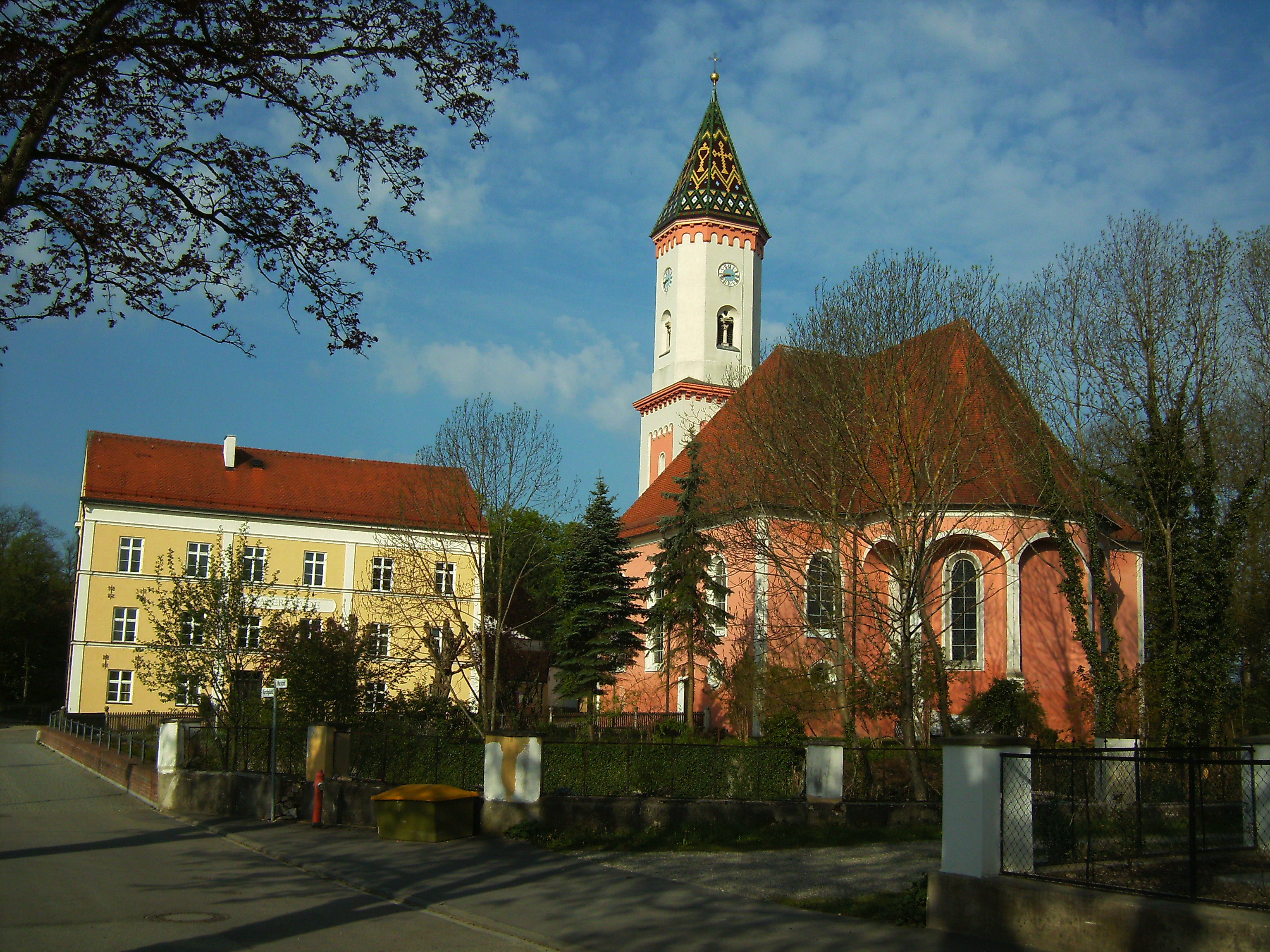 Kirche Maria Himmelfahrt in Altenstadt (Iller), Ortsteil Illereichen